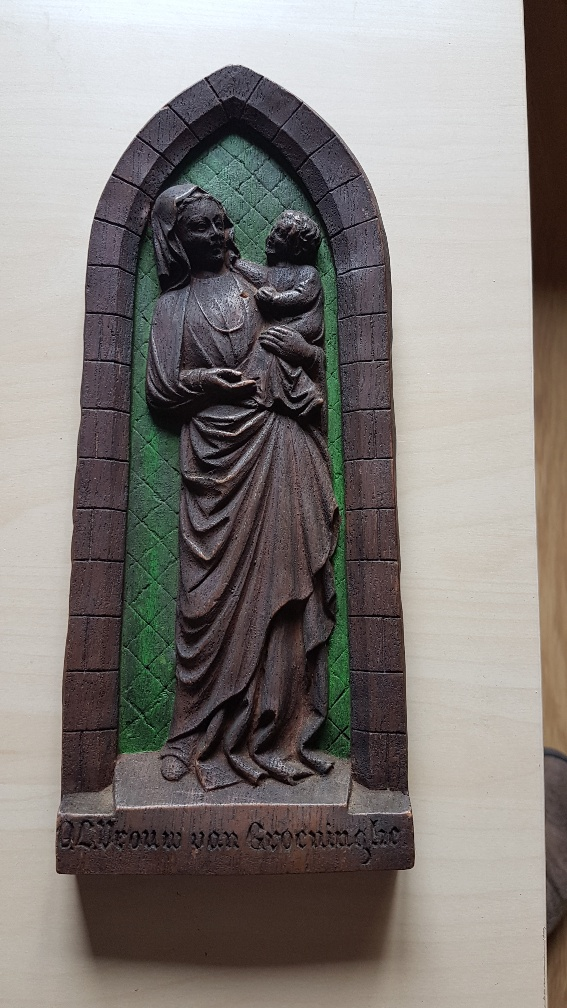 Dans le temps ceci constituait un cadeau traditionnel lors des communions et professions de Foi